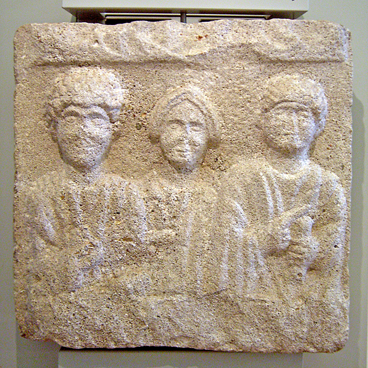 Römisches Grabrelief im Schlossmuseum Linz/OÖ